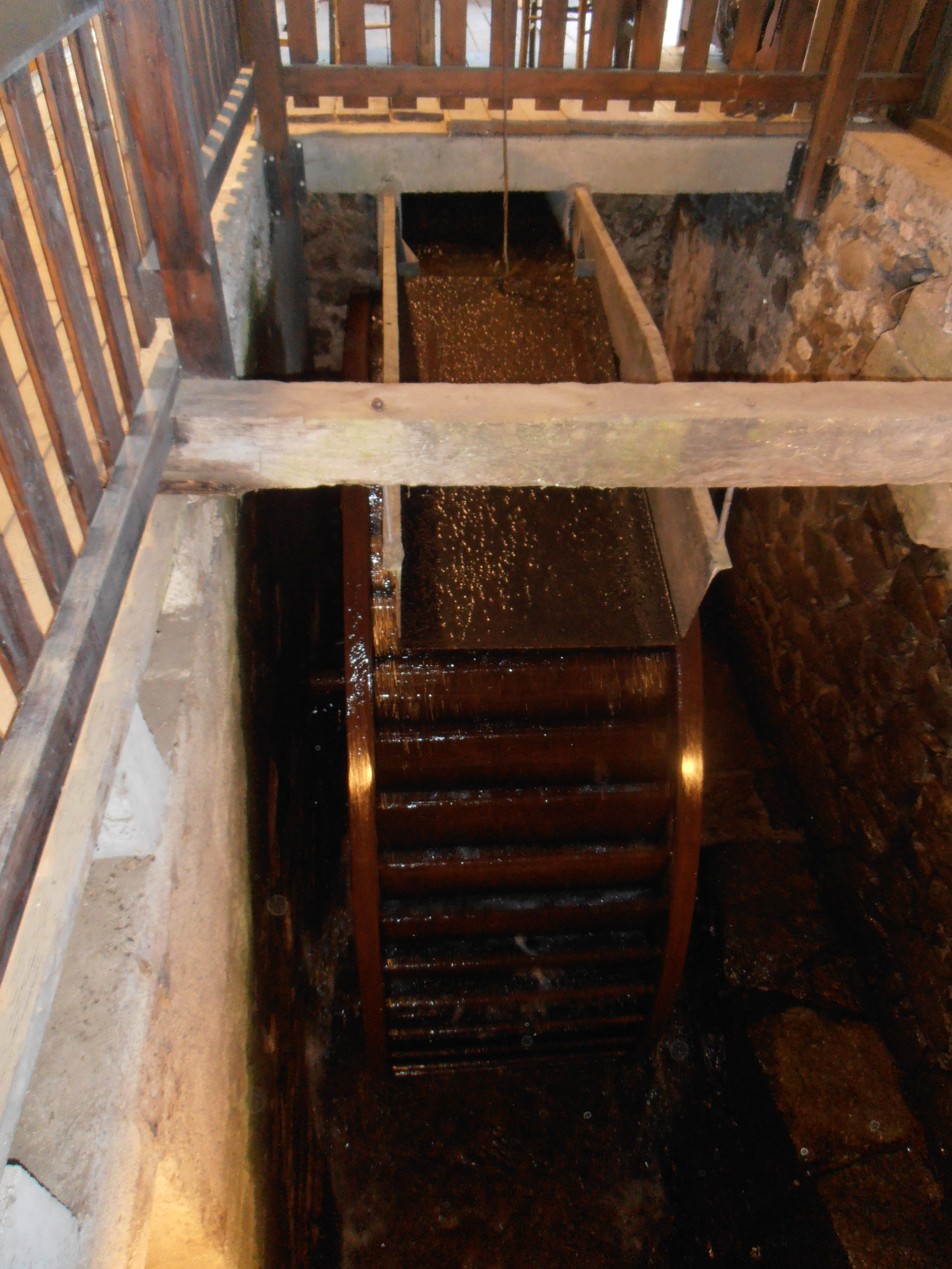 Vosges, Saulxures-sur-Moselotte, Musée du bois. Roue à augets. La Maison de la Forêt et du bois des Vosges, L’ancienne la scierie Haut Fer du Rupt de Bâmont conservée en « Maison de la forêt et du bois des Vosges » et des installations centenaires sont encore en place, dont le célèbre haut fer vosgien, et roue à augets de 4m20 de diamètre en fonctionnement, ainsi qu’une collection d'outils anciens illustrant les métiers du bois de la montagne vosgienne.